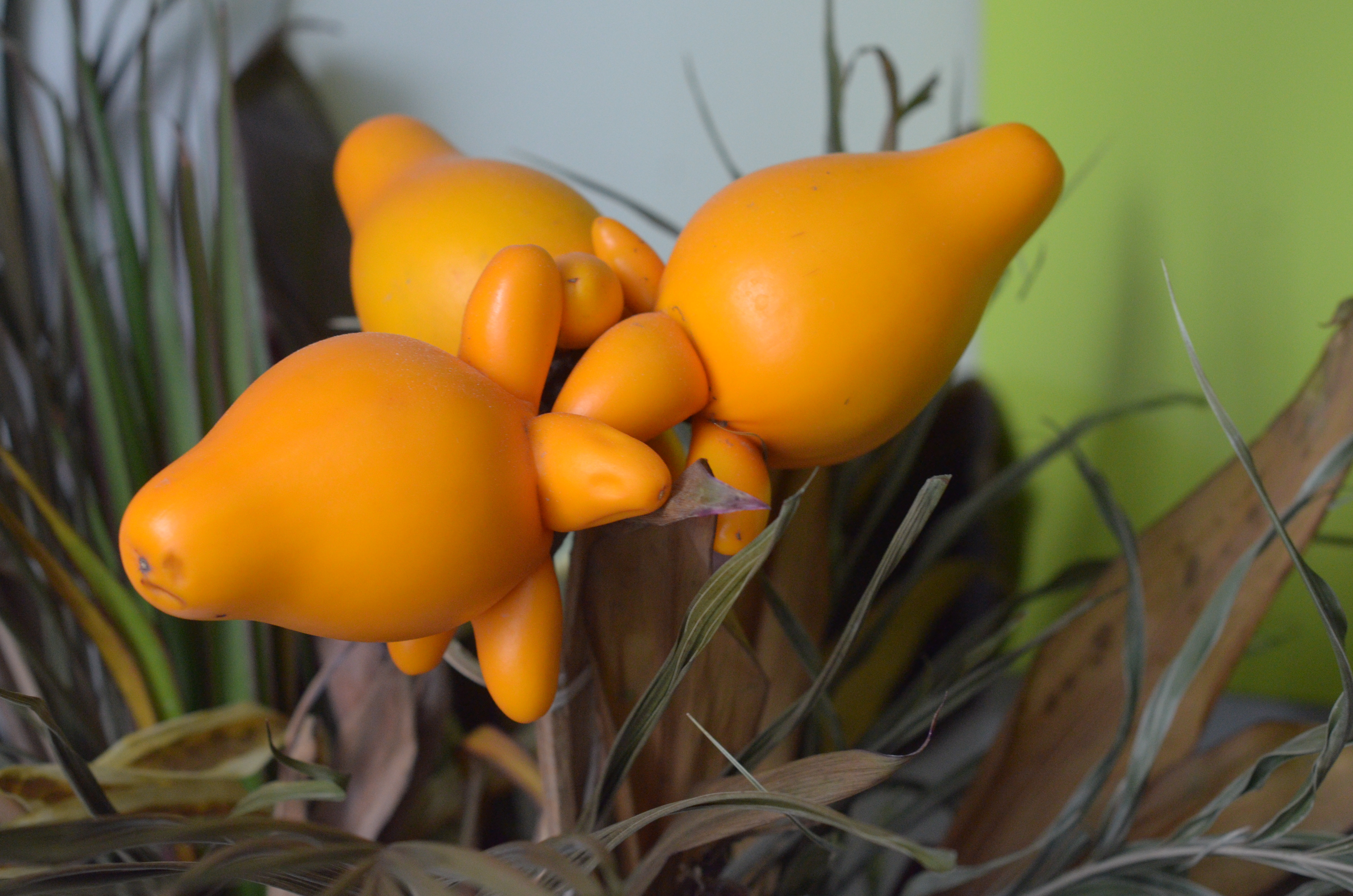 Растение